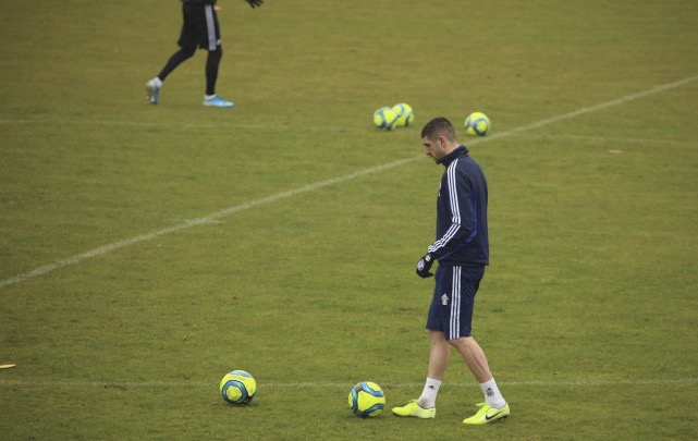 Entrainement RCS - Stefan Mitrovic